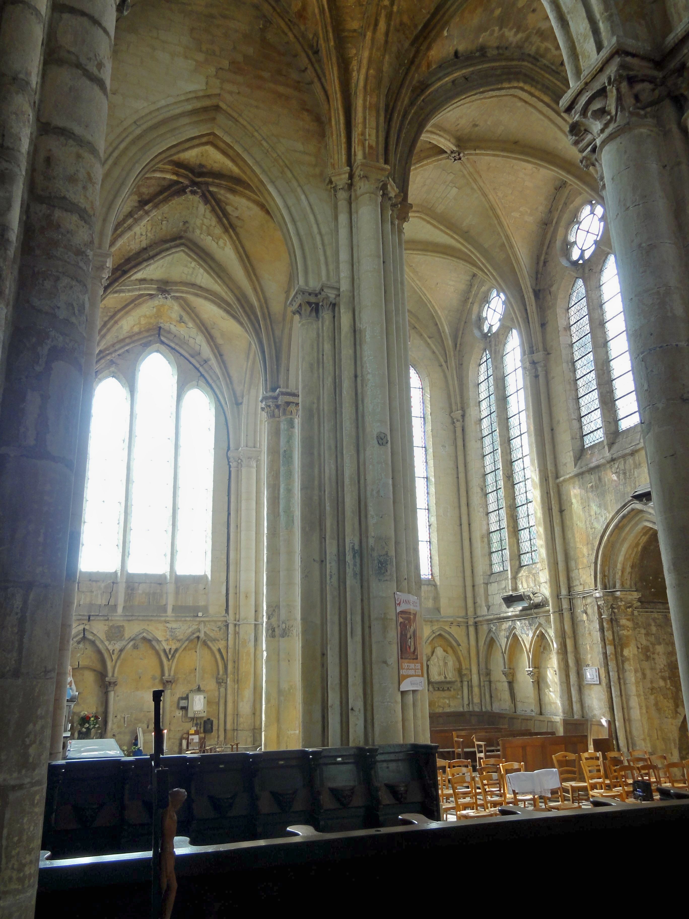 Vue diagonale vers le croisillon sud depuis la chapelle latérale nord.